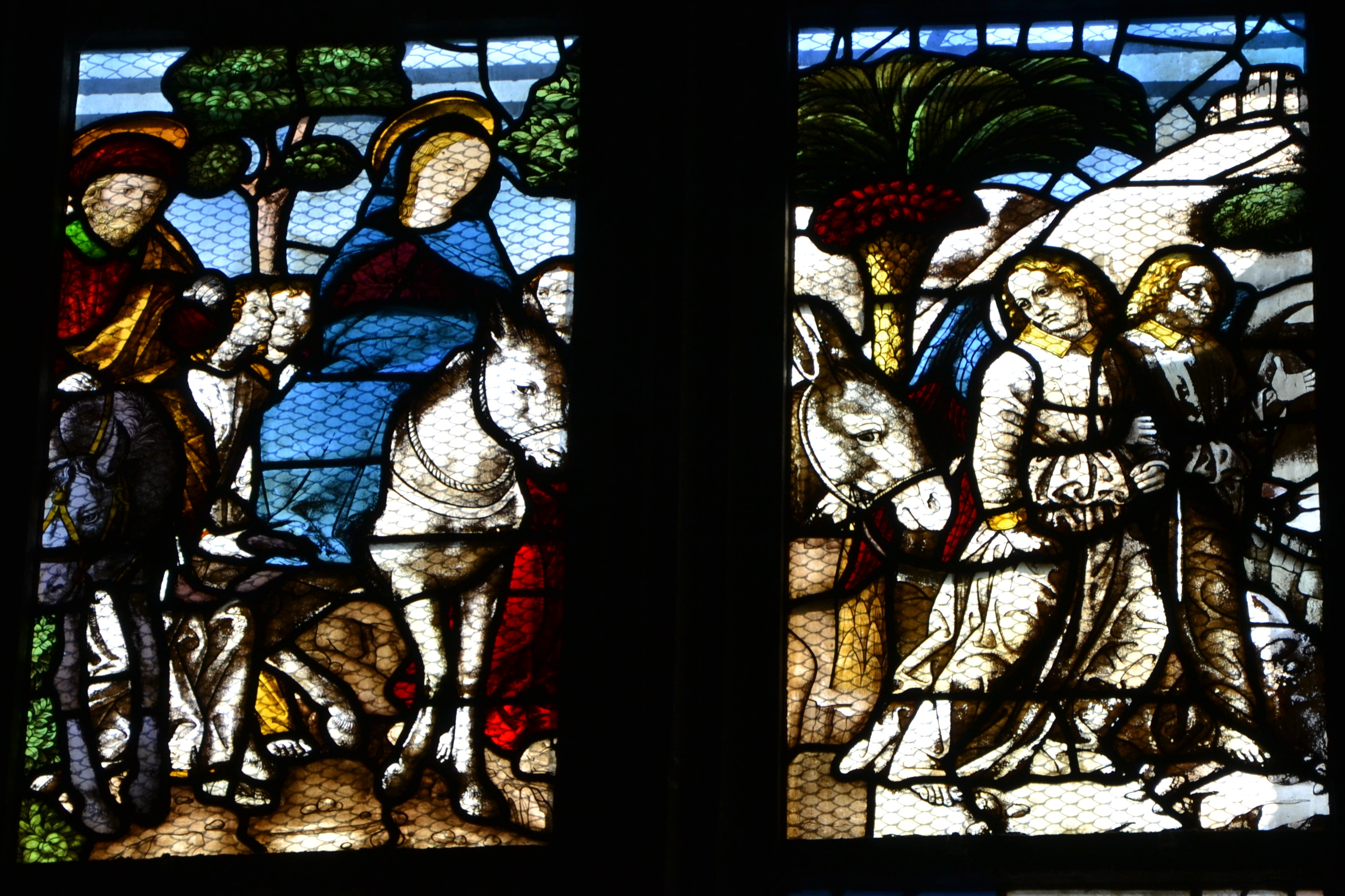 Milano, Duomo, Vetrata del nuovoTestamento, navata destra, XV secolo